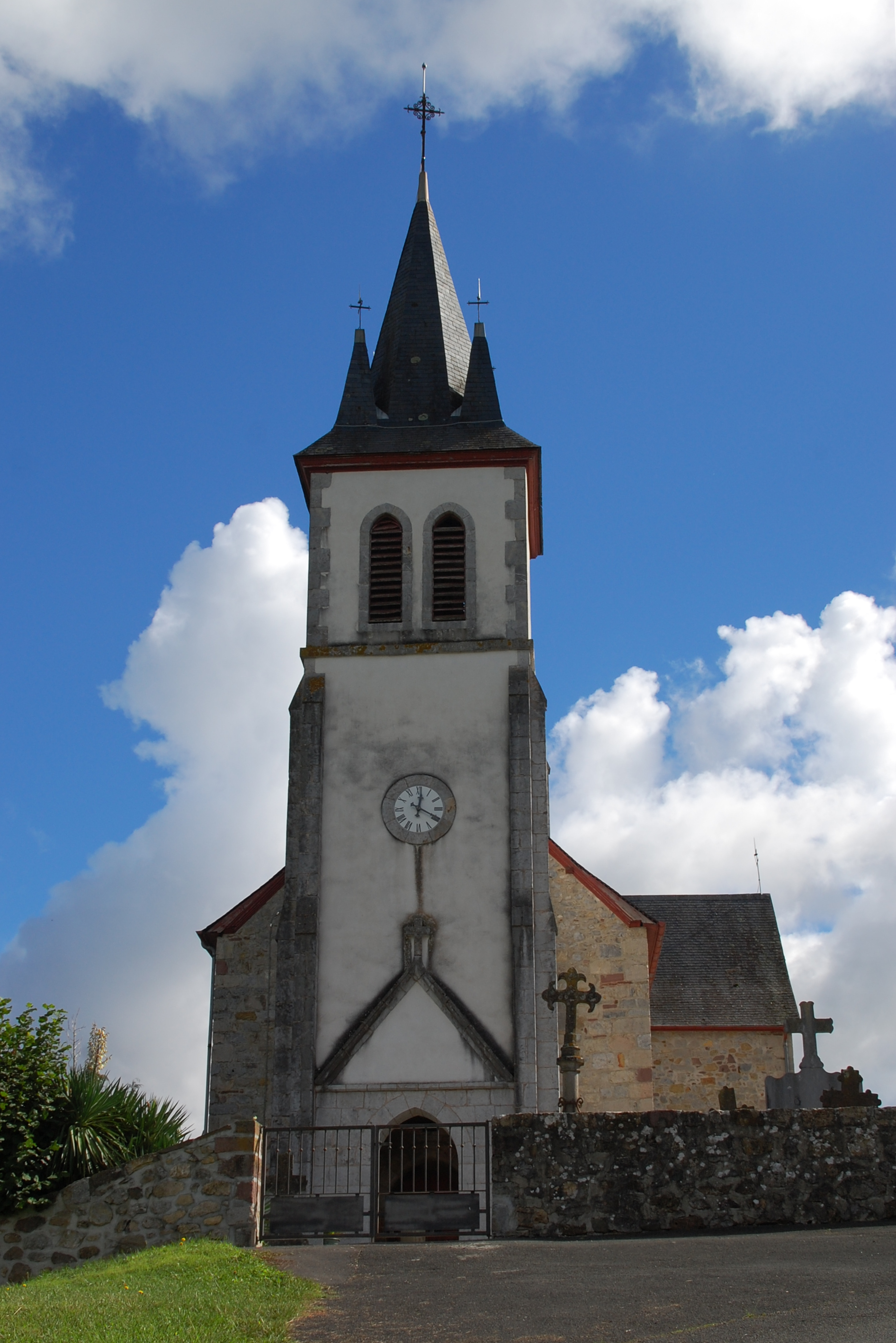 Église de Bussunaritz